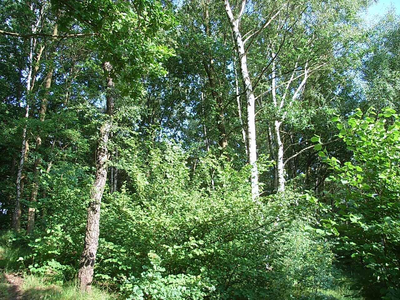 Birken-Eichenwald, Zwiesel, Schnauckenbergl